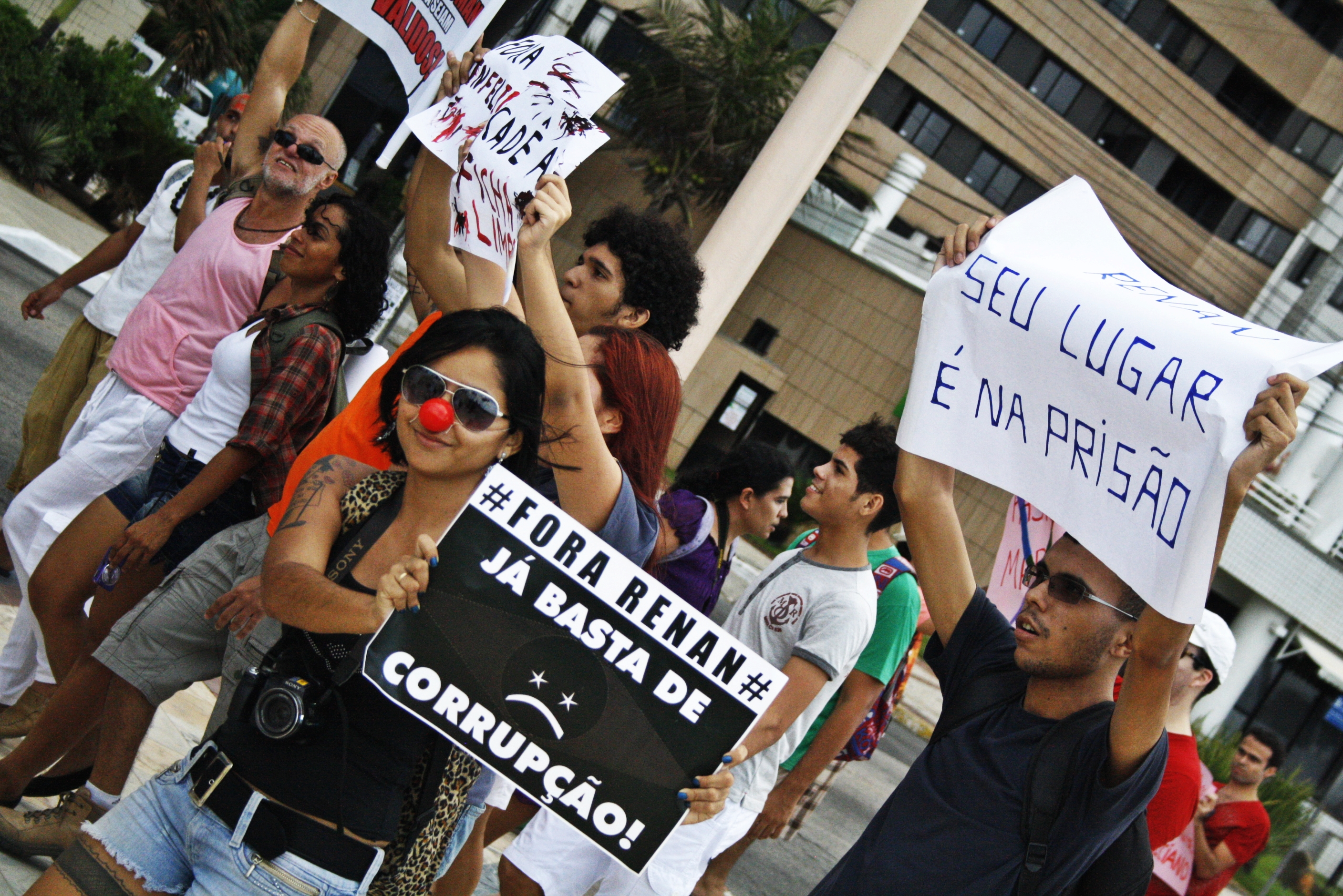 09/03/2013 Manifestantes foram às ruas em Fortaleza em ato contra nomeação de Marcos Feliciano para Comissão de Direitos Humanos. (CC BY-SA Fora do Eixo)